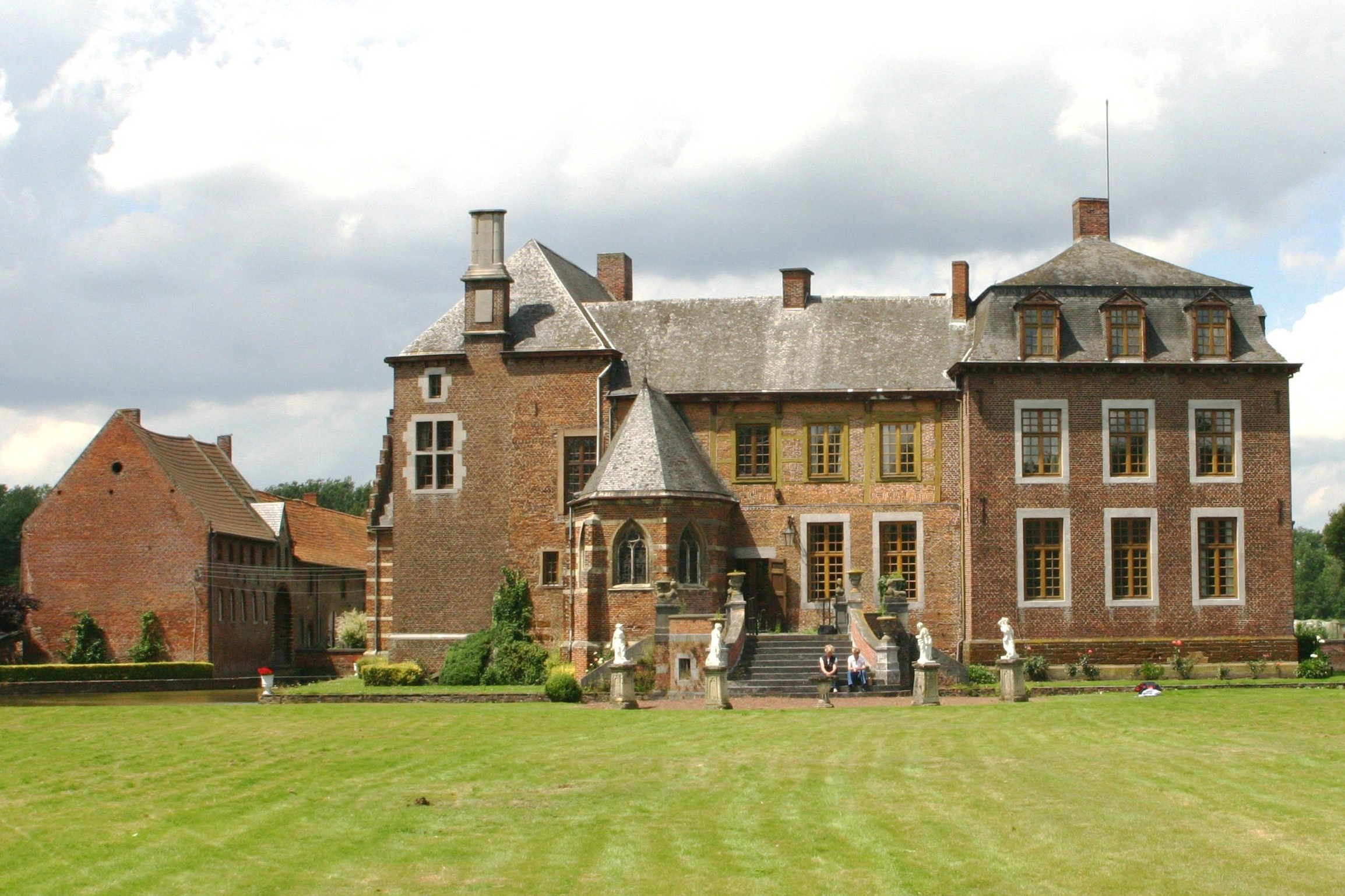 Schlass 't Loye vun hannen. Kategorie:Provënz Limburg